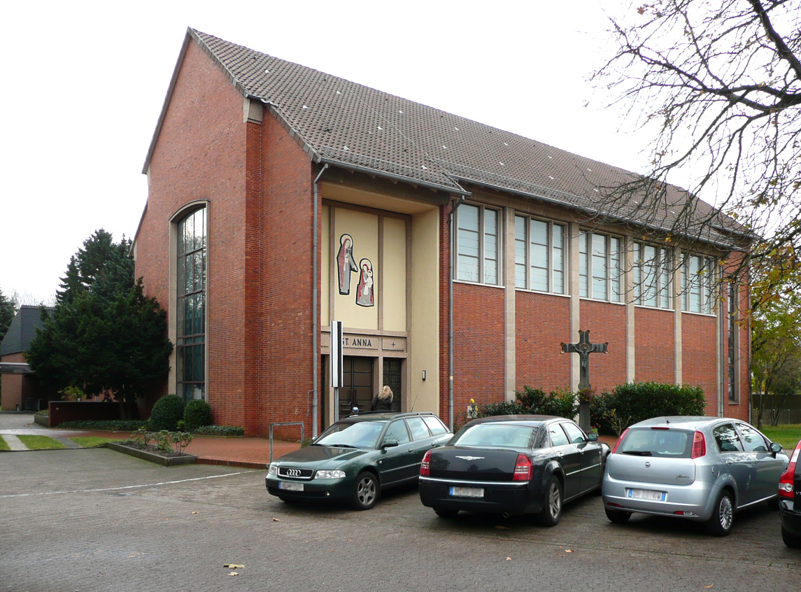 Misburg, St.Anna Kirche